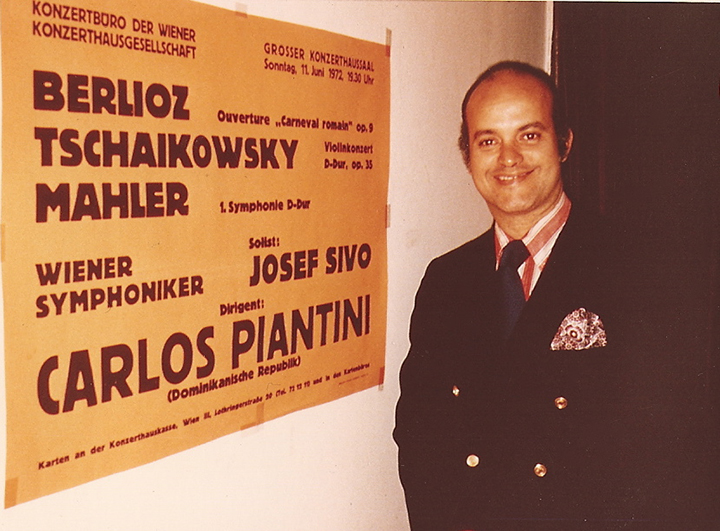 This is a picture of my father, Carlos Piantini, taken during the time he was conducting the Vienna Philharmonic in 1972.